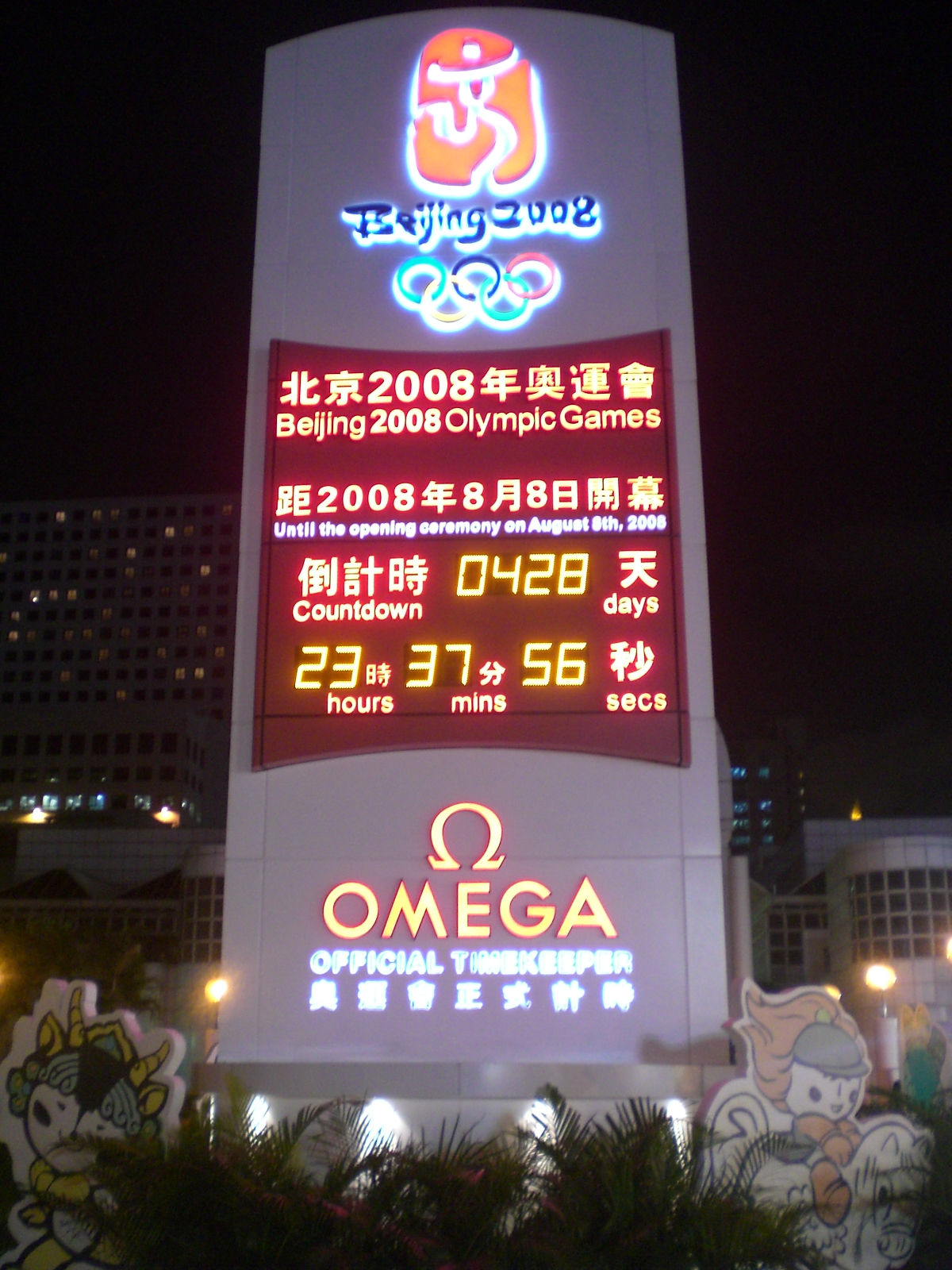 位於zh:香港zh:九龍公園的2008年夏季奧林匹克運動會倒數計時鐘. Author= RoxRox